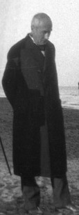 Adolf Schulten en una visita a un jaciment de València. Cap al 1932. [Museu de Prehistòria de València - Arxiu Negatius - 3525].